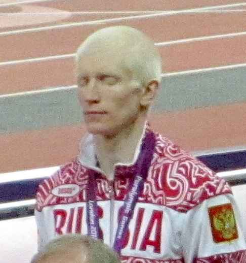 Fedor Trikolich